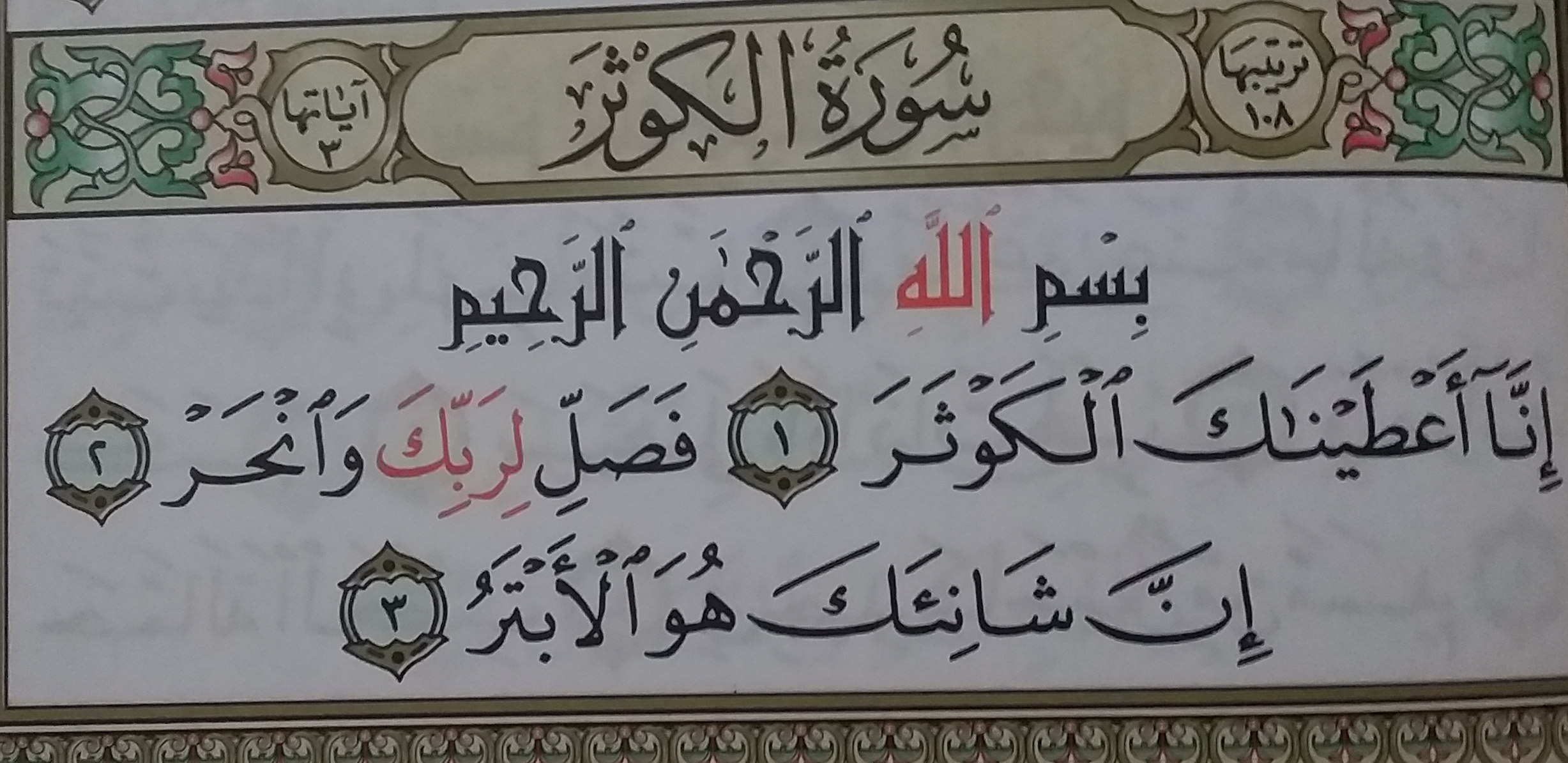 صورة لسورة الكوثر بالرسم العثماني برواية حفص عن عاصم